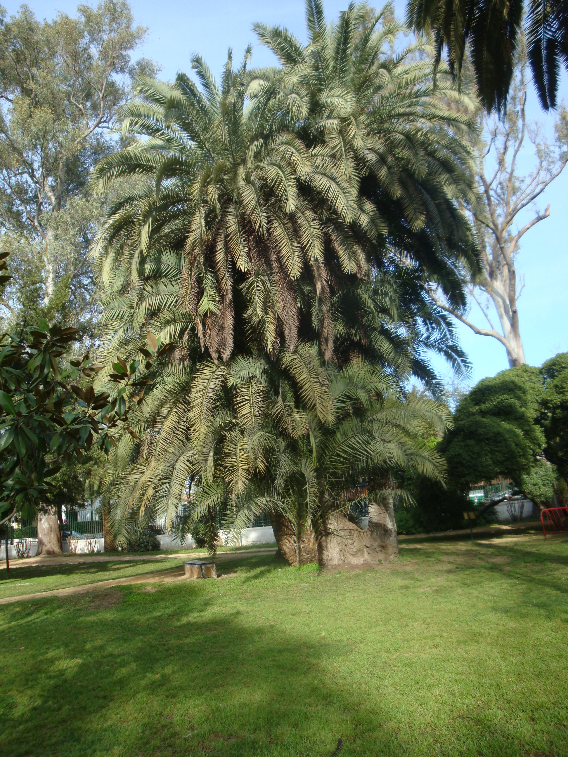 Palmeras frondosas en parque María Luisa de Sevilla